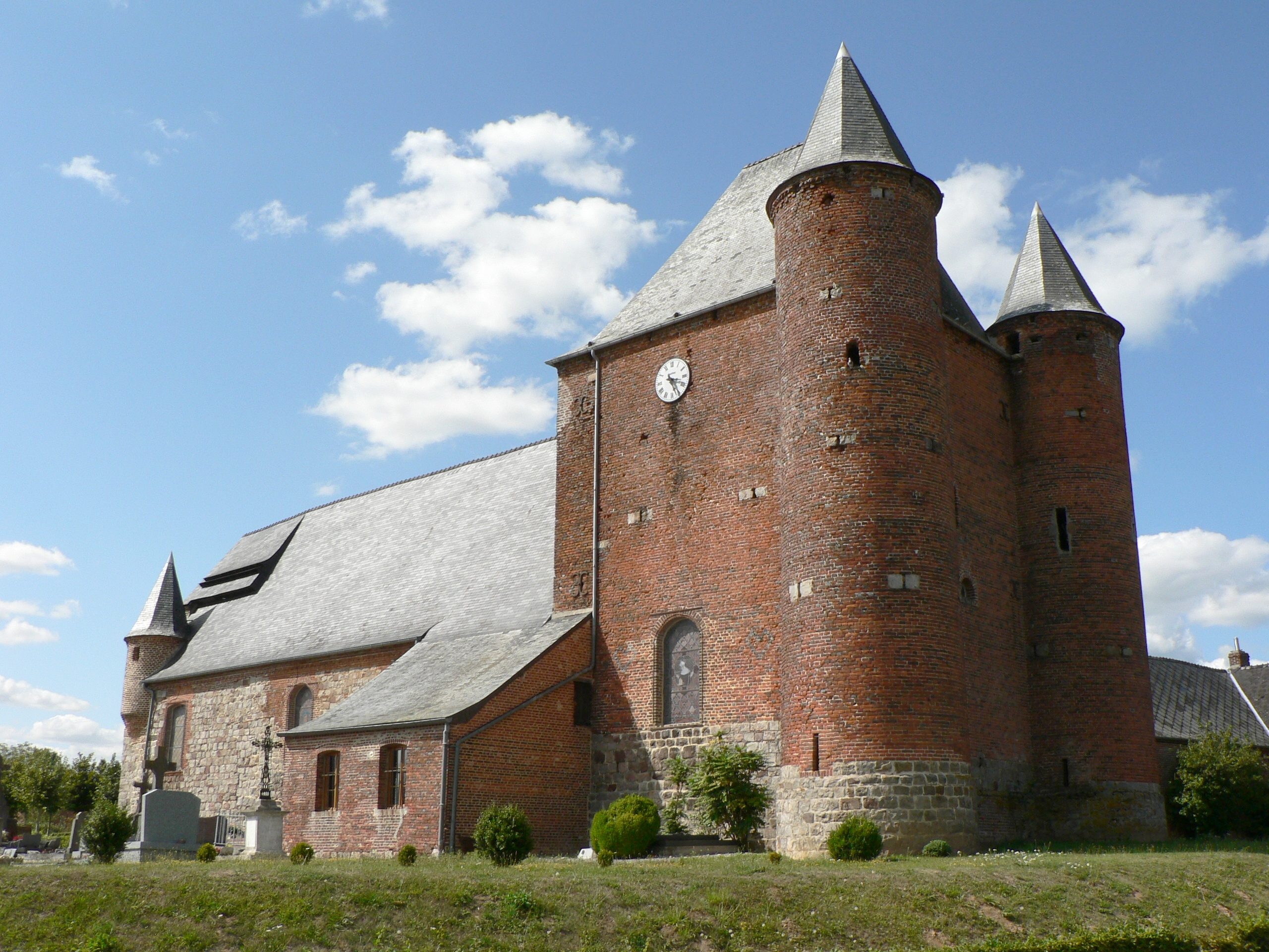 Église fortifiée de Englancourt, Aisne, France